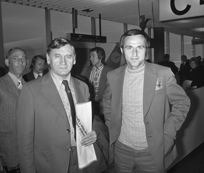 Pools voetbal-elftal komt aan op Schiphol, trainer Kazimierz Górski en Jan Domarski (rechts).